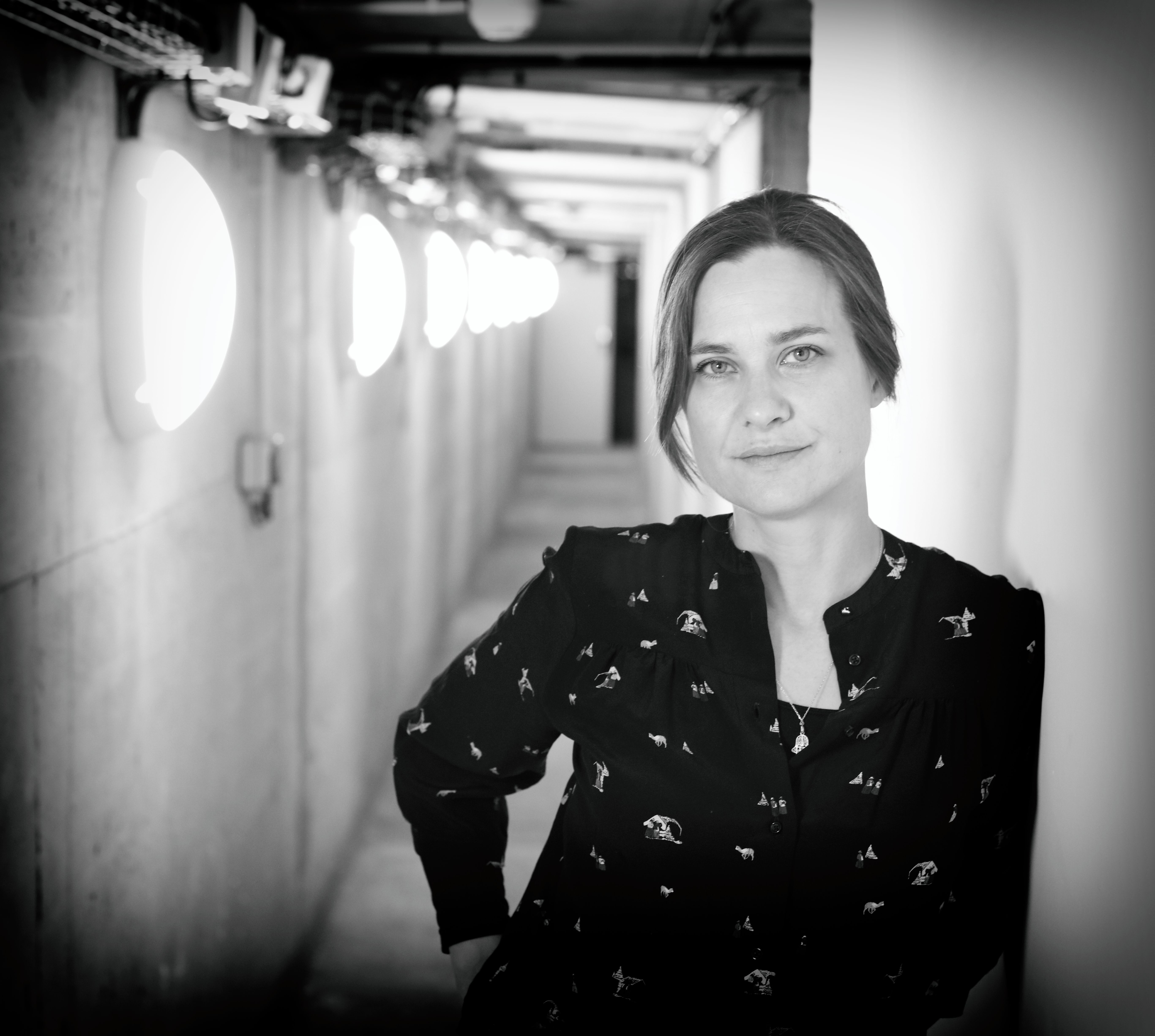 Chloe Dabert